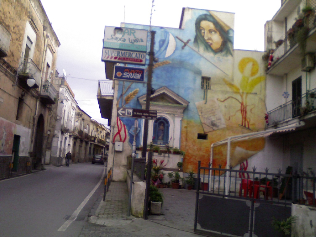 Una zona del centro di Casatori